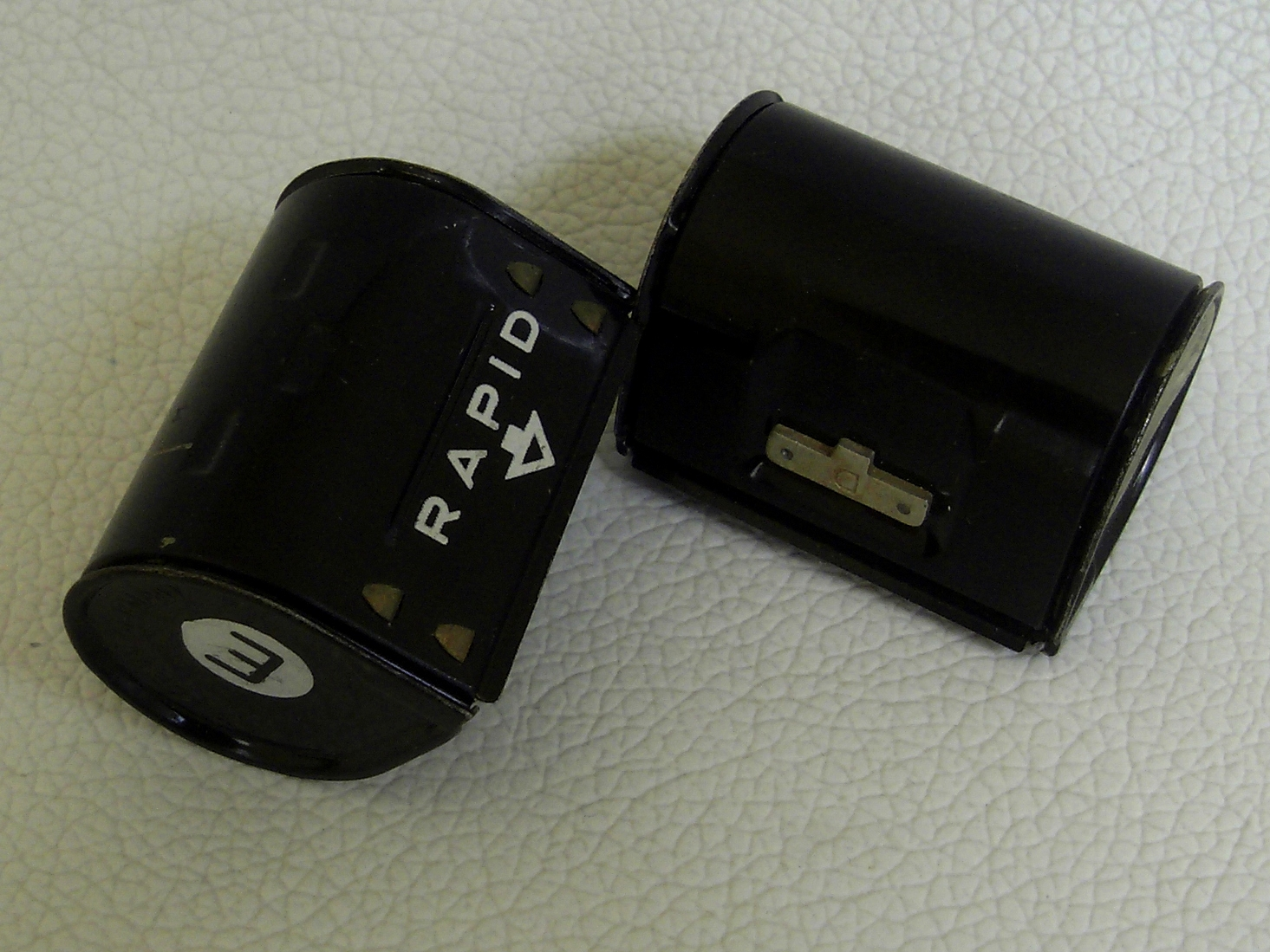 Karat Rapid Filmdosen